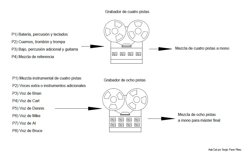 Esquema de grabación multipista empleando el método de reducción de pistas empleado para la grabación del álbum Pet Sounds de The Beach Boys en 1966.